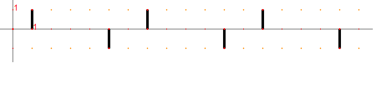 créé sous cabrigéomètre